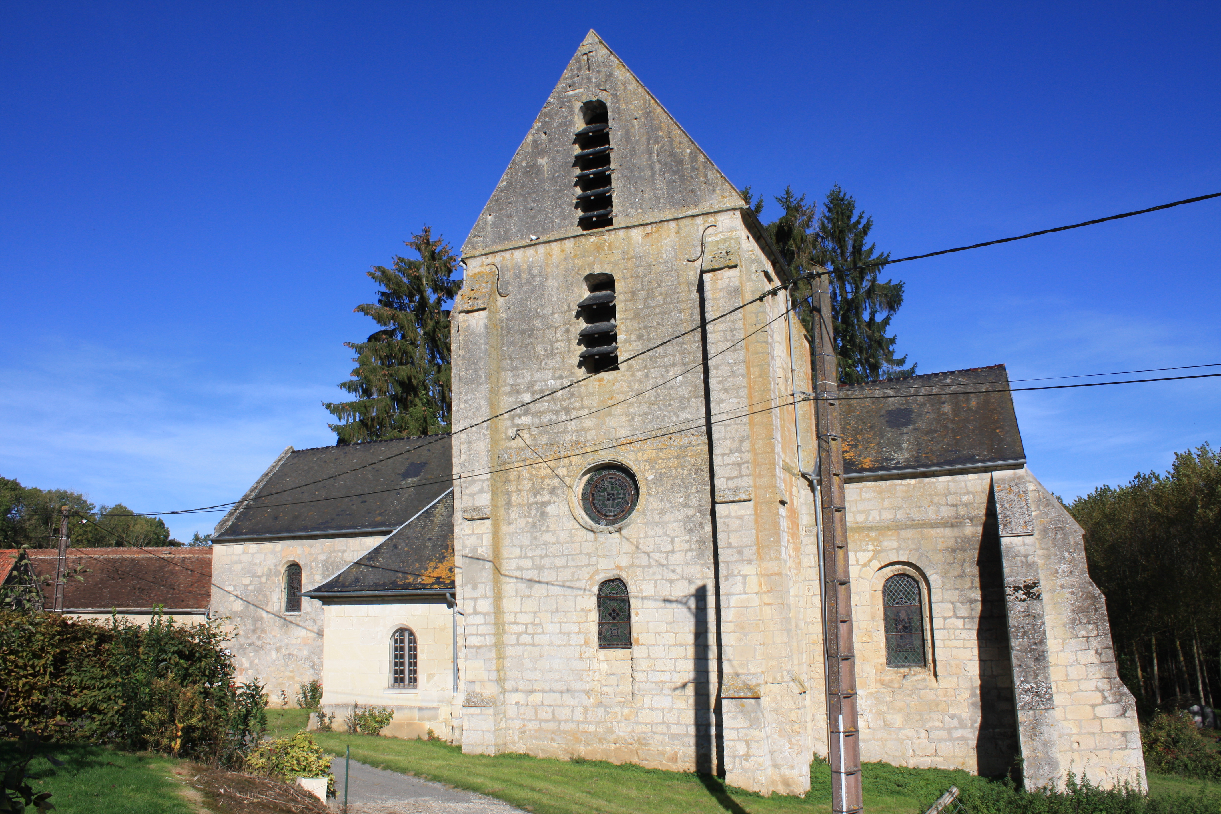 Église Saint-Rufin-et-Sainte-Valère de Loupeigne